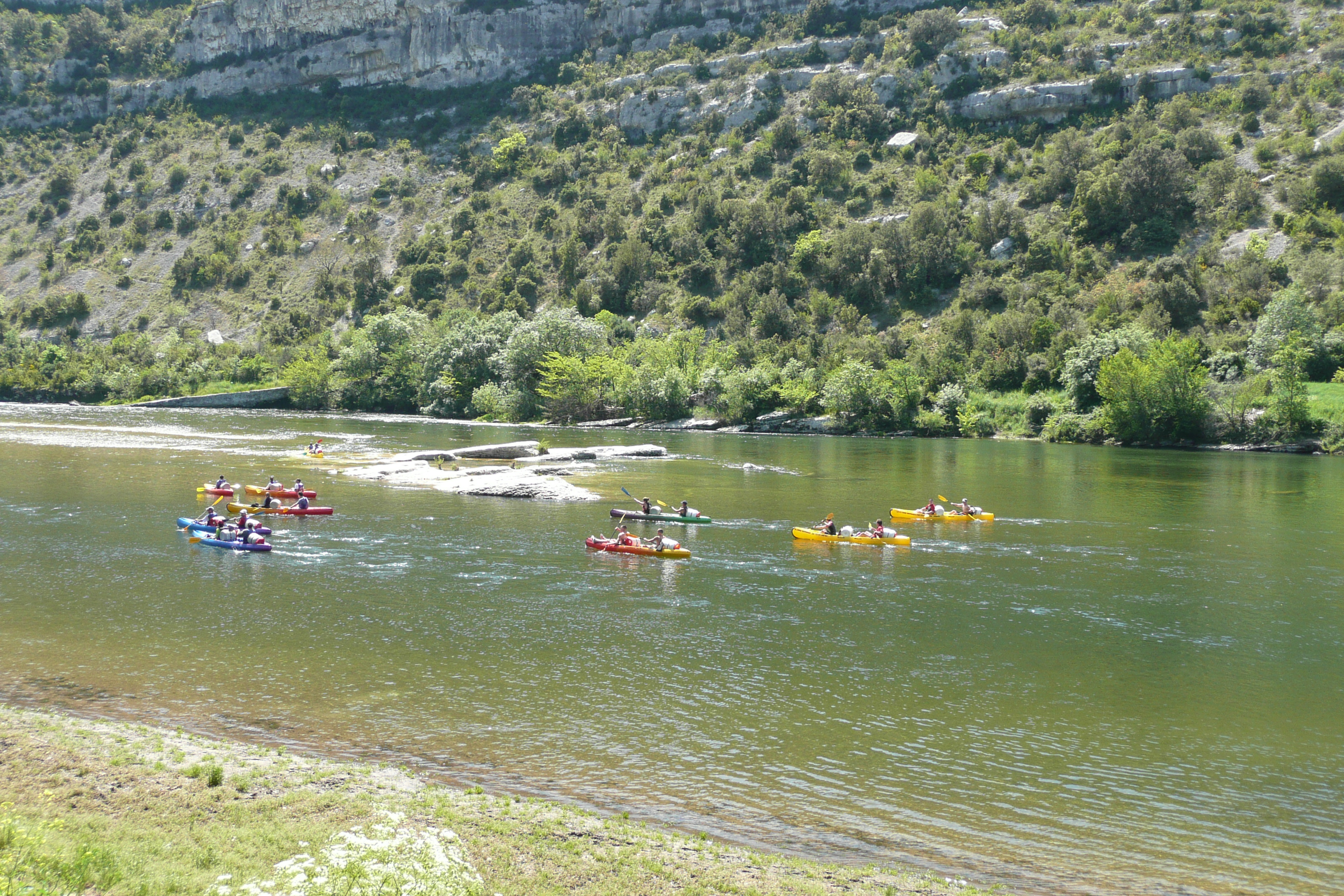 La rivière Ardèche à Sauze près de Saint-Martin-d'Ardèche.